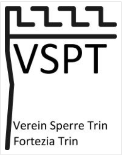 Logo Verein Sperre Trin, Trin GR, Schweiz